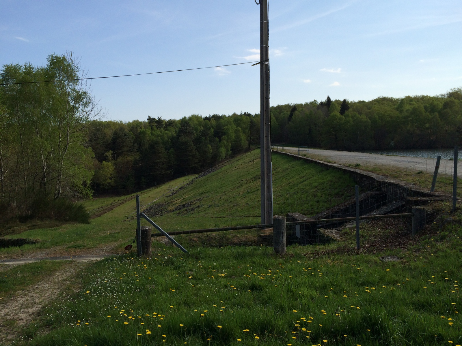 Staudamm des Lac de St-Pardoux, Talseite